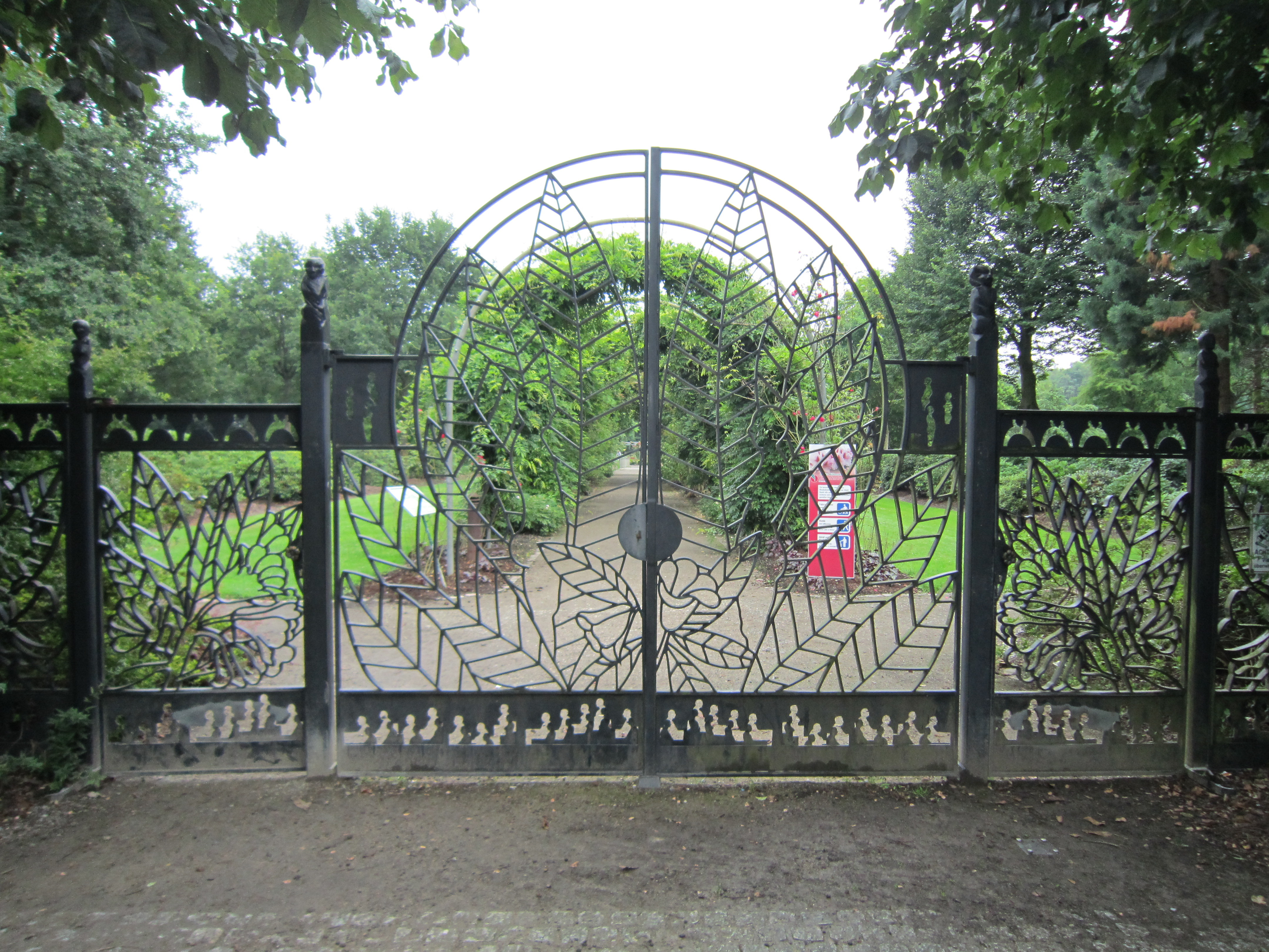 Nordwestlicher Eingang des Rhododendronparks Bremen